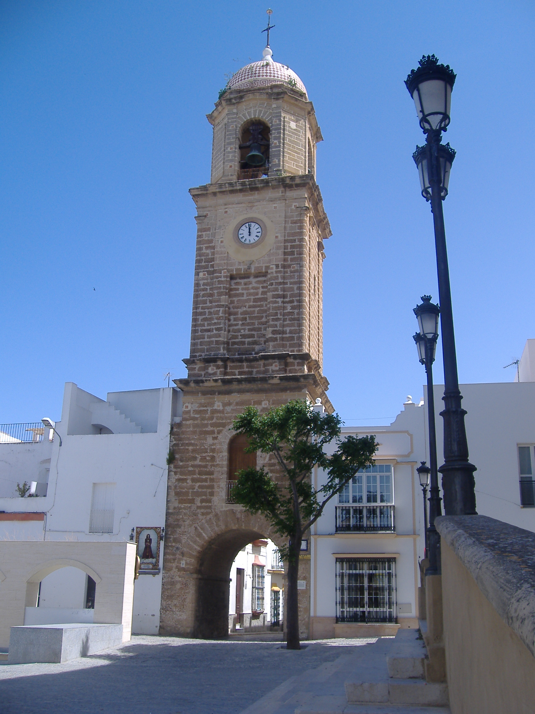 Chiclana. Torre del reloj, desde la plaza mayor